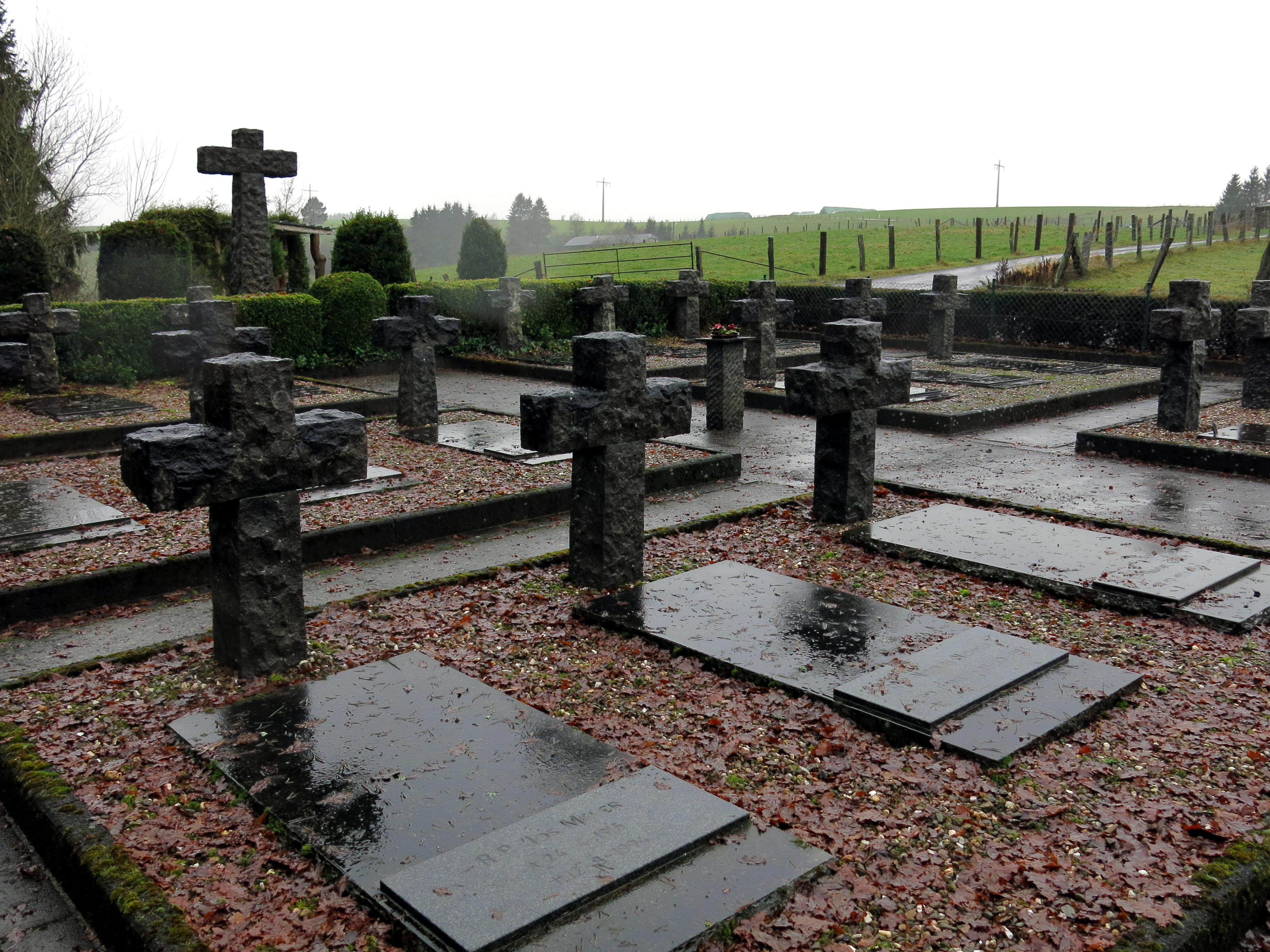 De Paterskierfecht vum Klouschter Cinqfontaines um Schreckebierg.